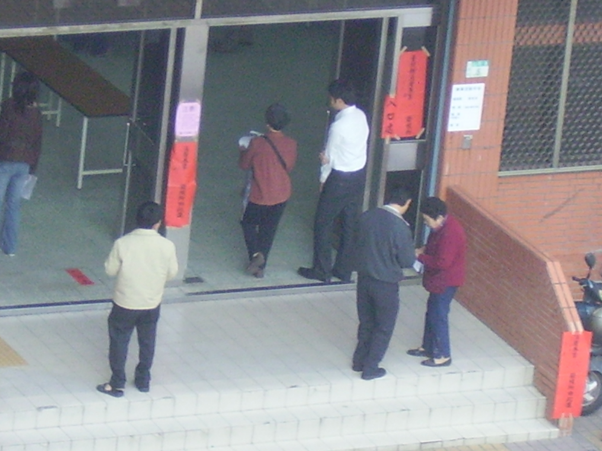 消費券發放現場